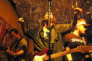 Jaya The Cat speelt in Ernesto's Cantina te Sittard. Foto gemaakt door Bart Notermans.